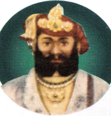 Kashi Rao Holkar, Maharaja of Holkar